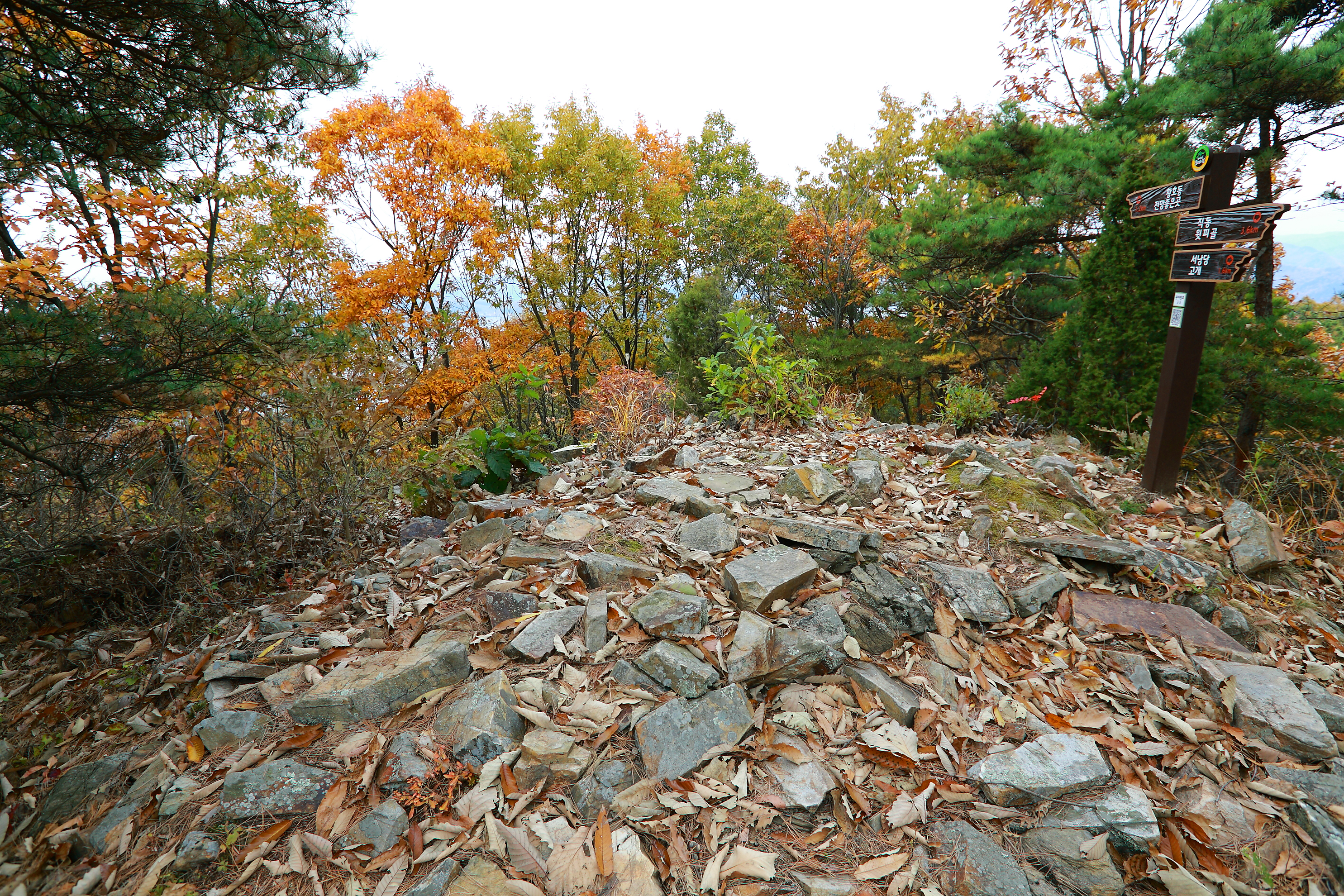 대청호오백리길 2구간_2